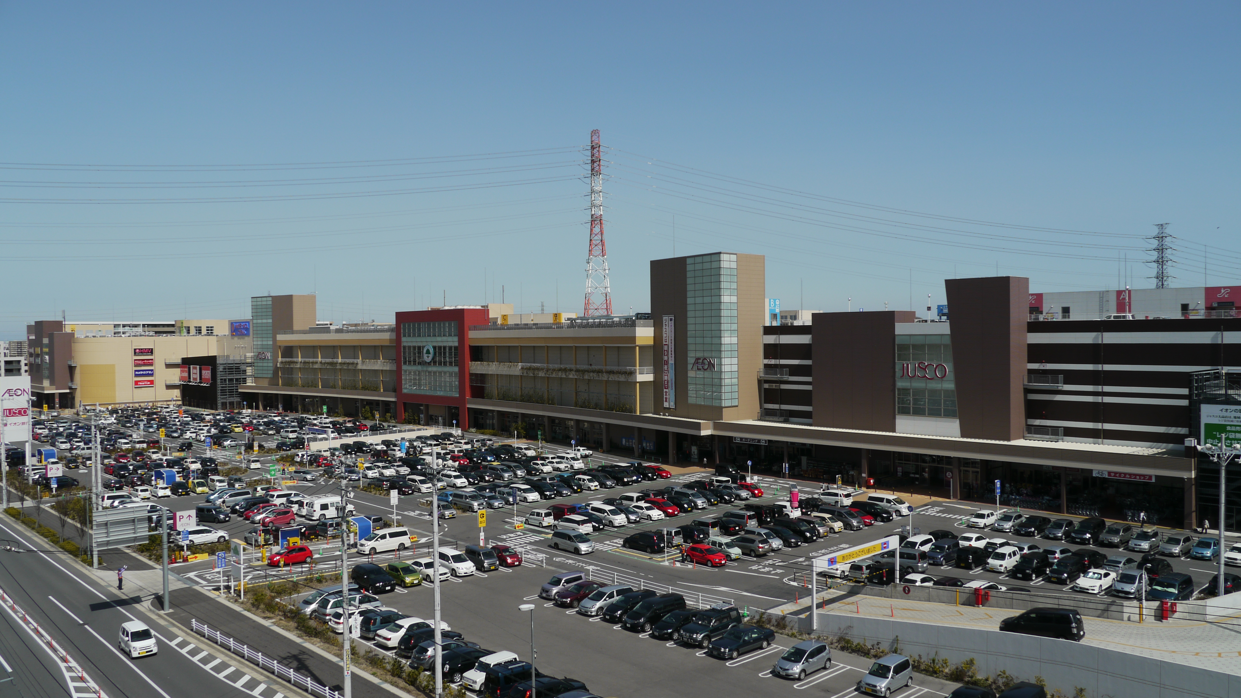 イオン大高ショッピングセンター。